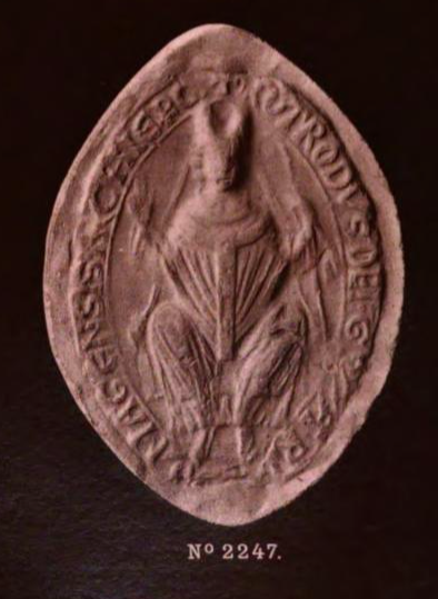 Rotrou de Warwick